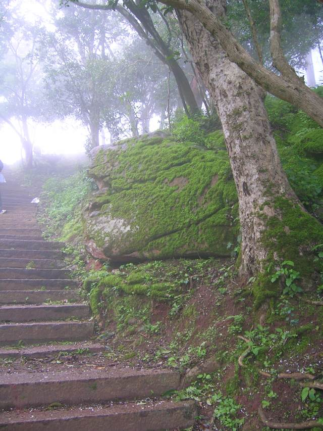 Steps going up Nandi Hills, Bangalore, India